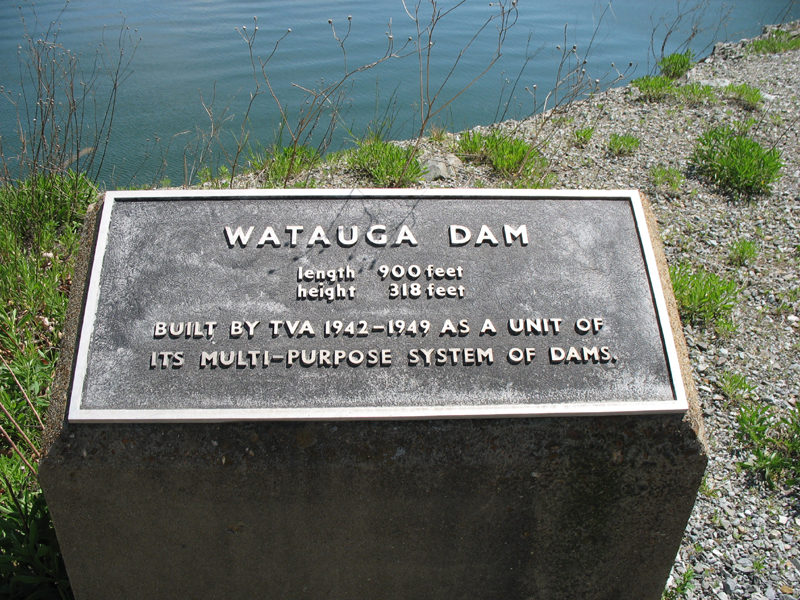 Watauga Dam marker at Watauga Lake.